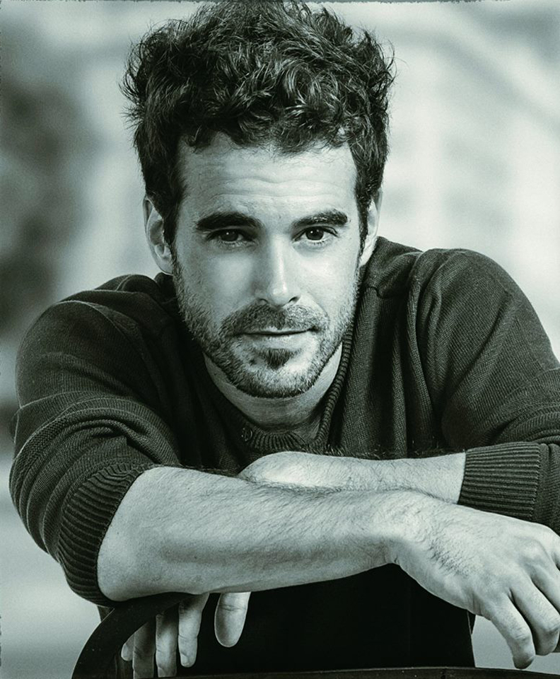 Nicolas Cabre 2014